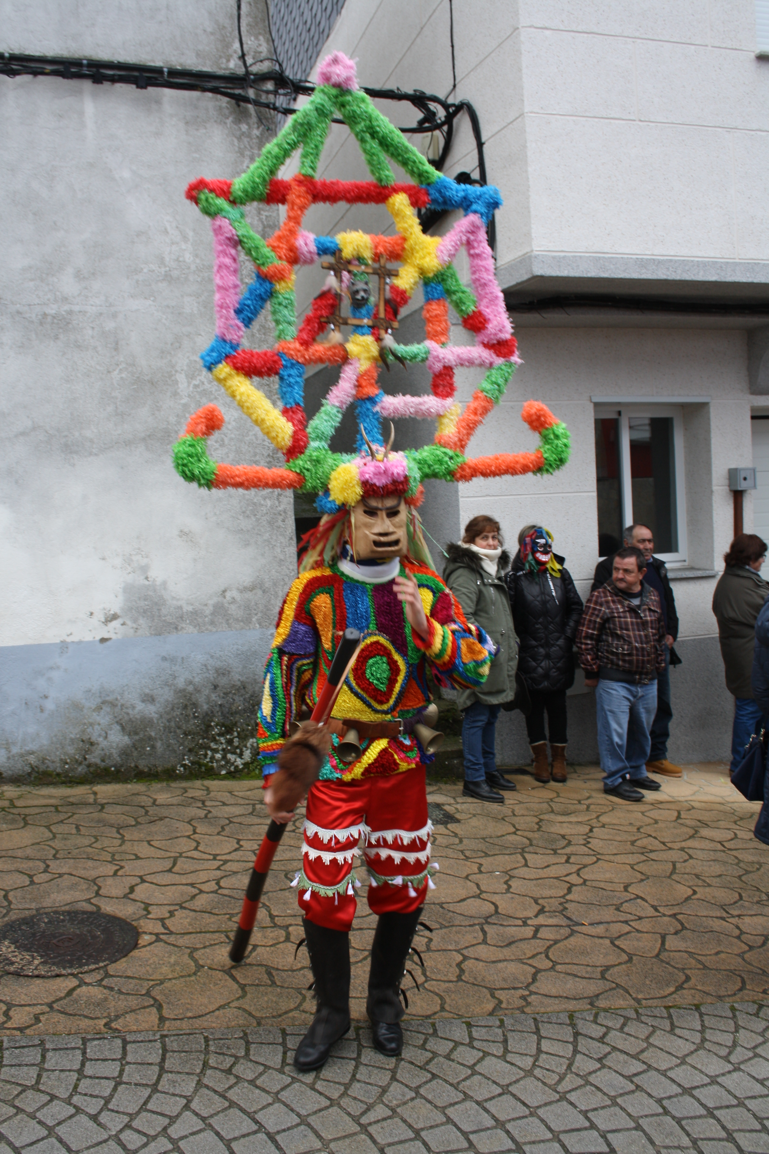 Boteiro del entroido de Viana do Bolo 2018.